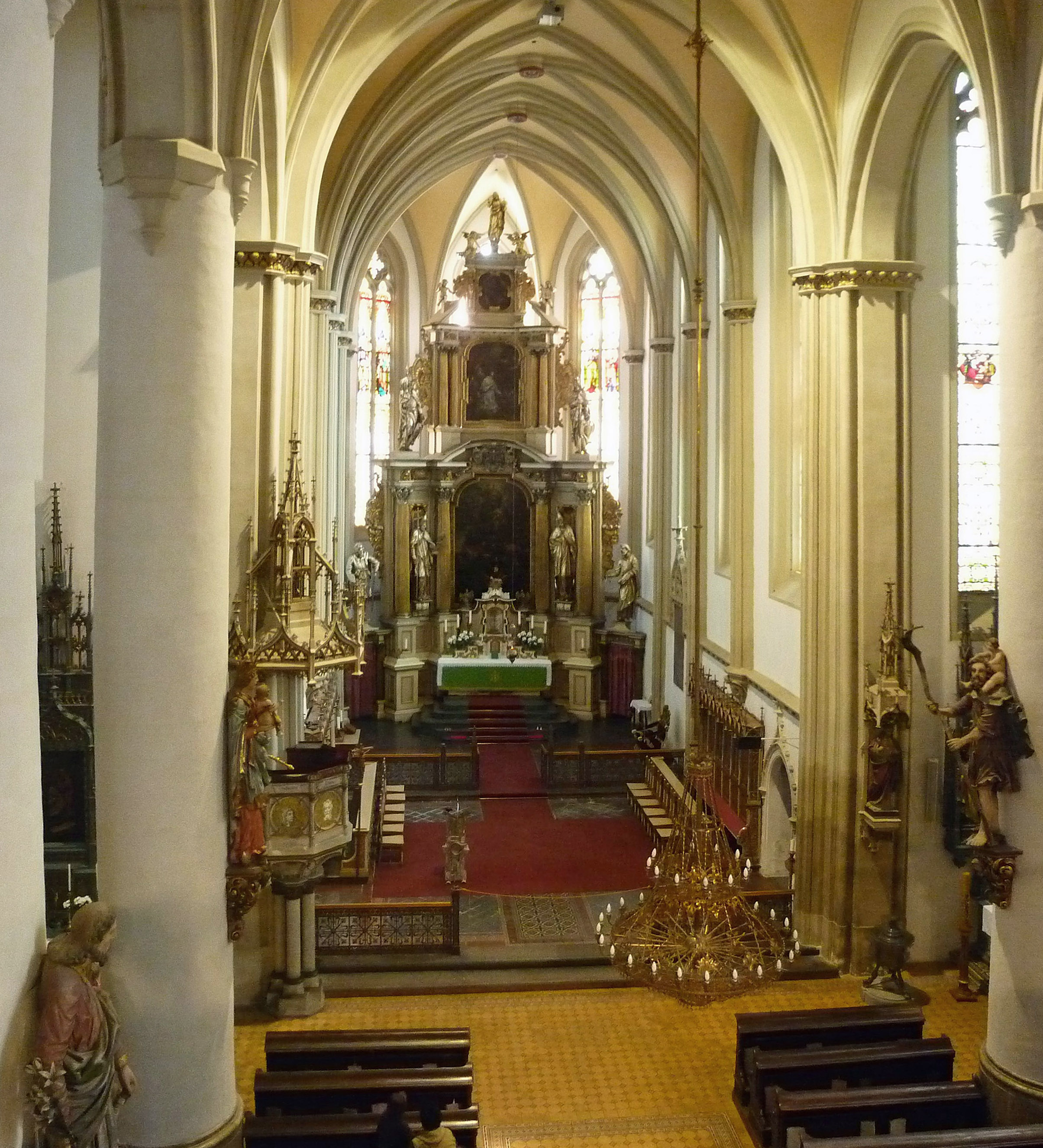 Saaz/Žatec, Dekanatskirche Mariä Himmelfahrt, Blick zum Altarraum